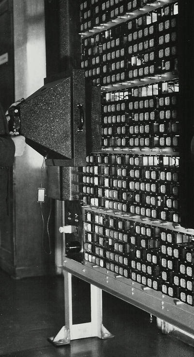 Schleifenzähler Fotographie